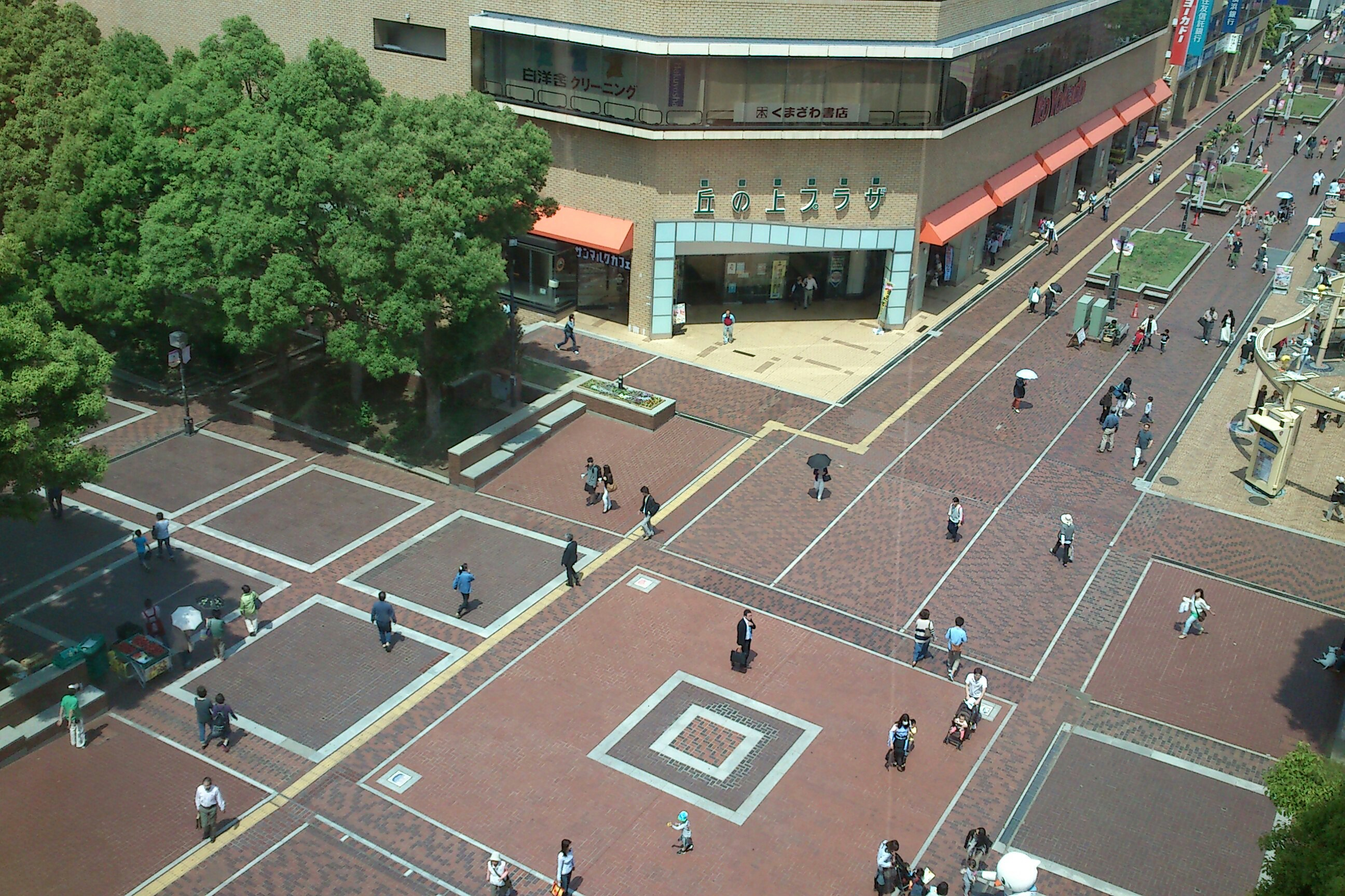 多摩センター駅前の歩行者デッキ（2013年5月25日撮影）